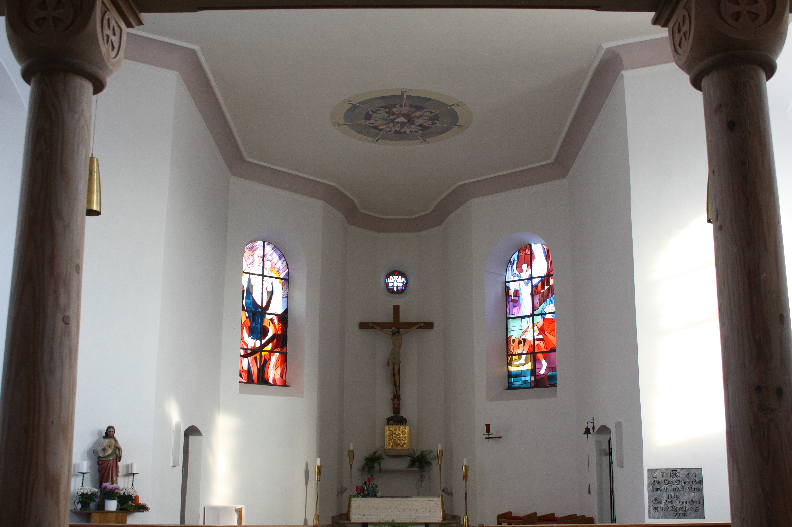 Katholische Pfarrkirche St. Johannes Evangelist in Altenberg (Gemeinde Syrgenstein) im Landkreis Dillingen an der Donau, Innenraum